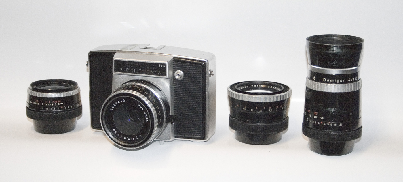 Kamera Pentina mit verfügbaren Objektiven